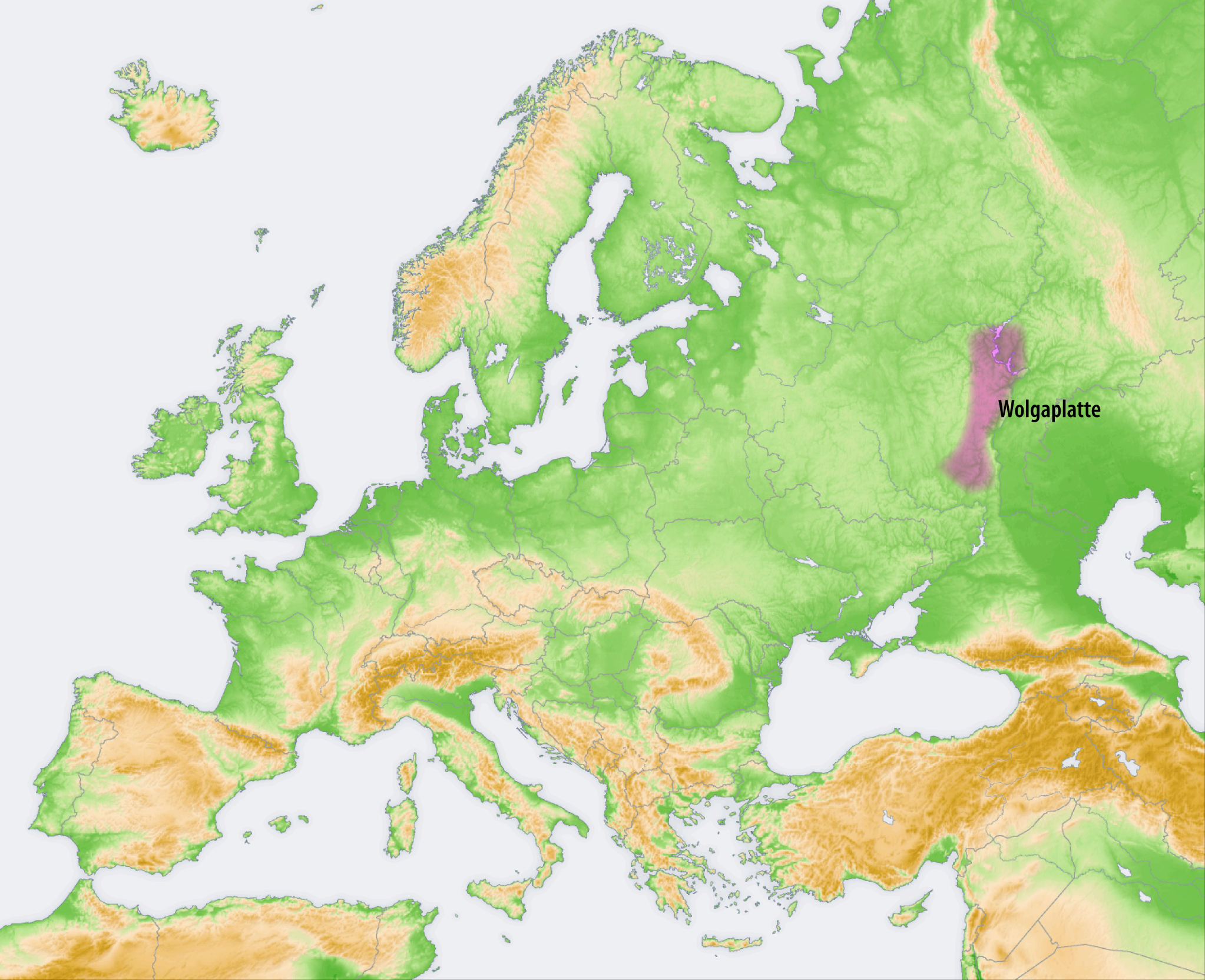 Landschaften der Osteuropäischen Ebene: Wolgaplatte